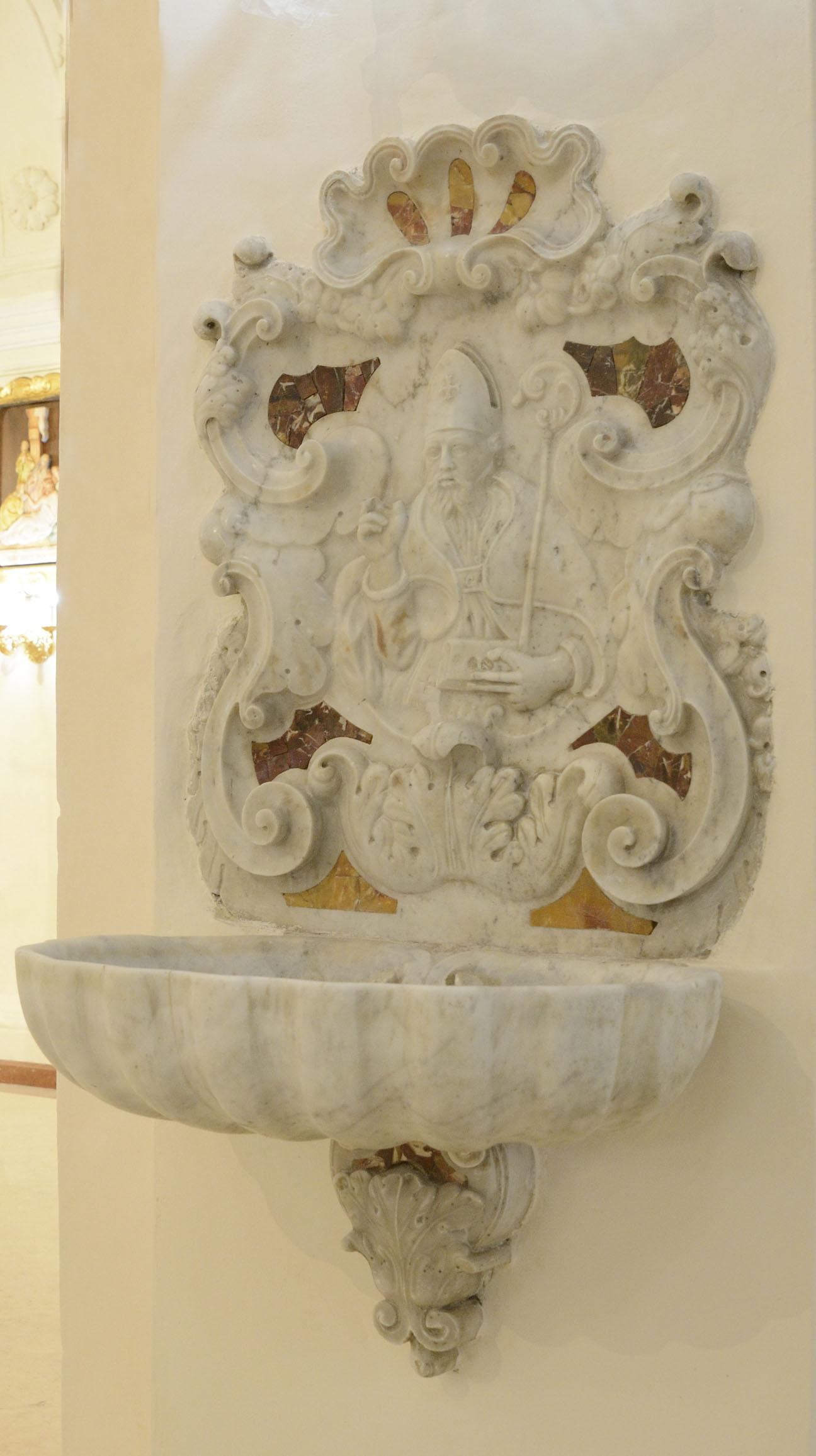 Arcangelo Staffetta – 1764 – acquasantiera. E’ situata nel 1° pilastro a destra, formata da vòlute che fanno da cornice a un bassorilievo con S.Nicola Benedicente e un poderoso bacino a forma di conchiglia. Il marmo bianco di Carrara è commesso al diaspro di Sicilia e al giallo di Siena.